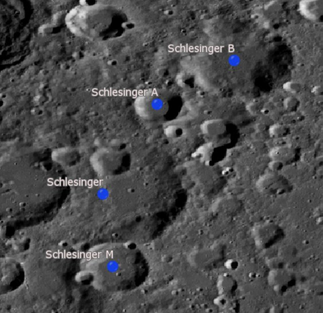 Cráter lunar Schlesinger. Cráteres satélite. (Imagen LRO)